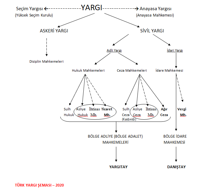 Türk Yargı Şeması